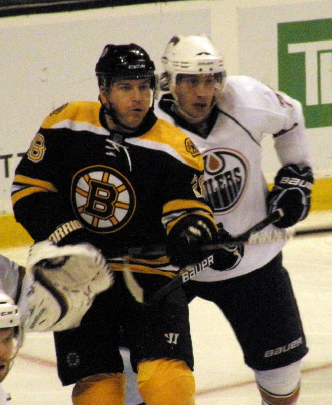 28 Mark Recchi (Bos), 77 Tom Gilbert (Edm)